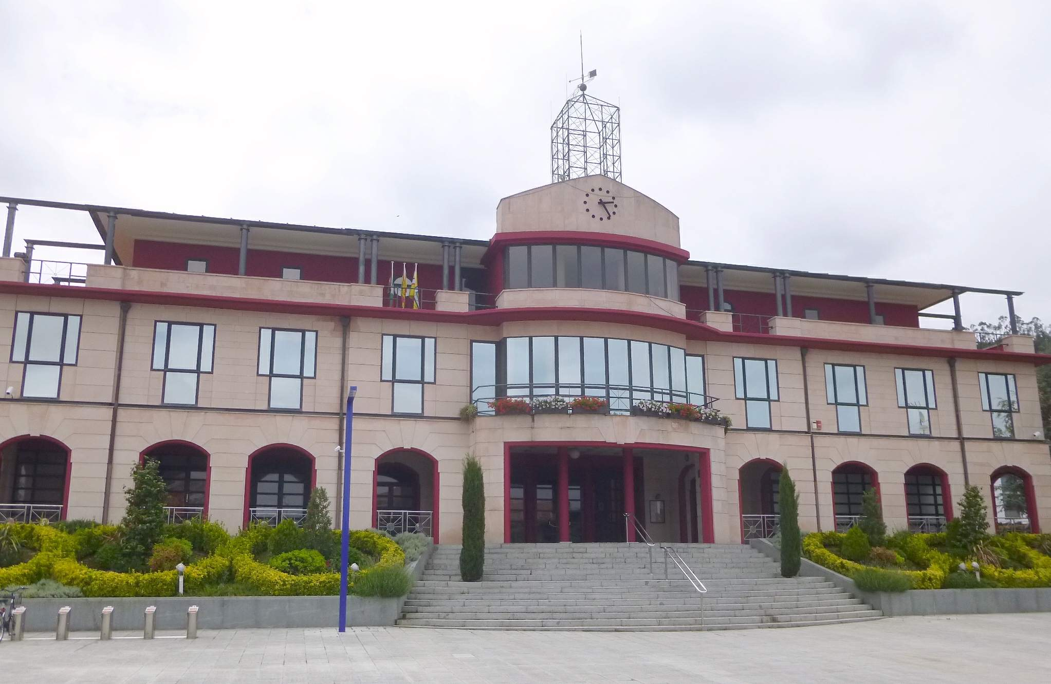 Ayuntamiento de Urduliz (Bizkaia)